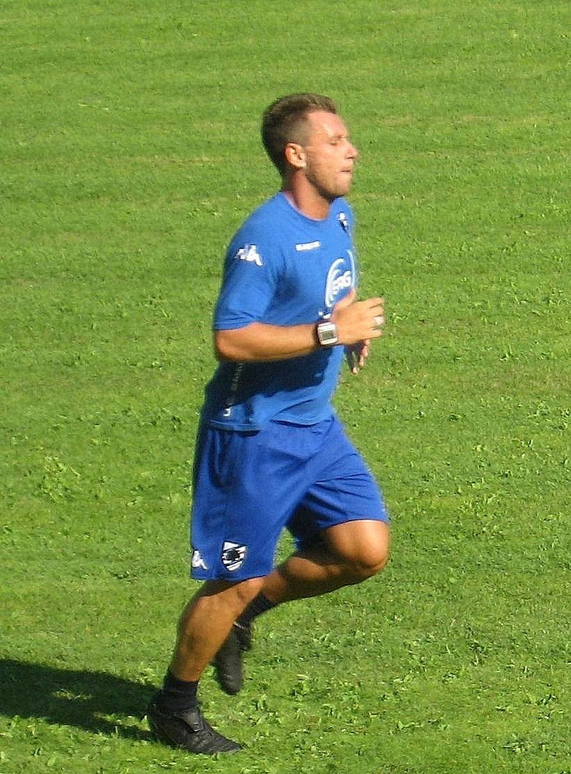 Il calciatore Antonio Cassano